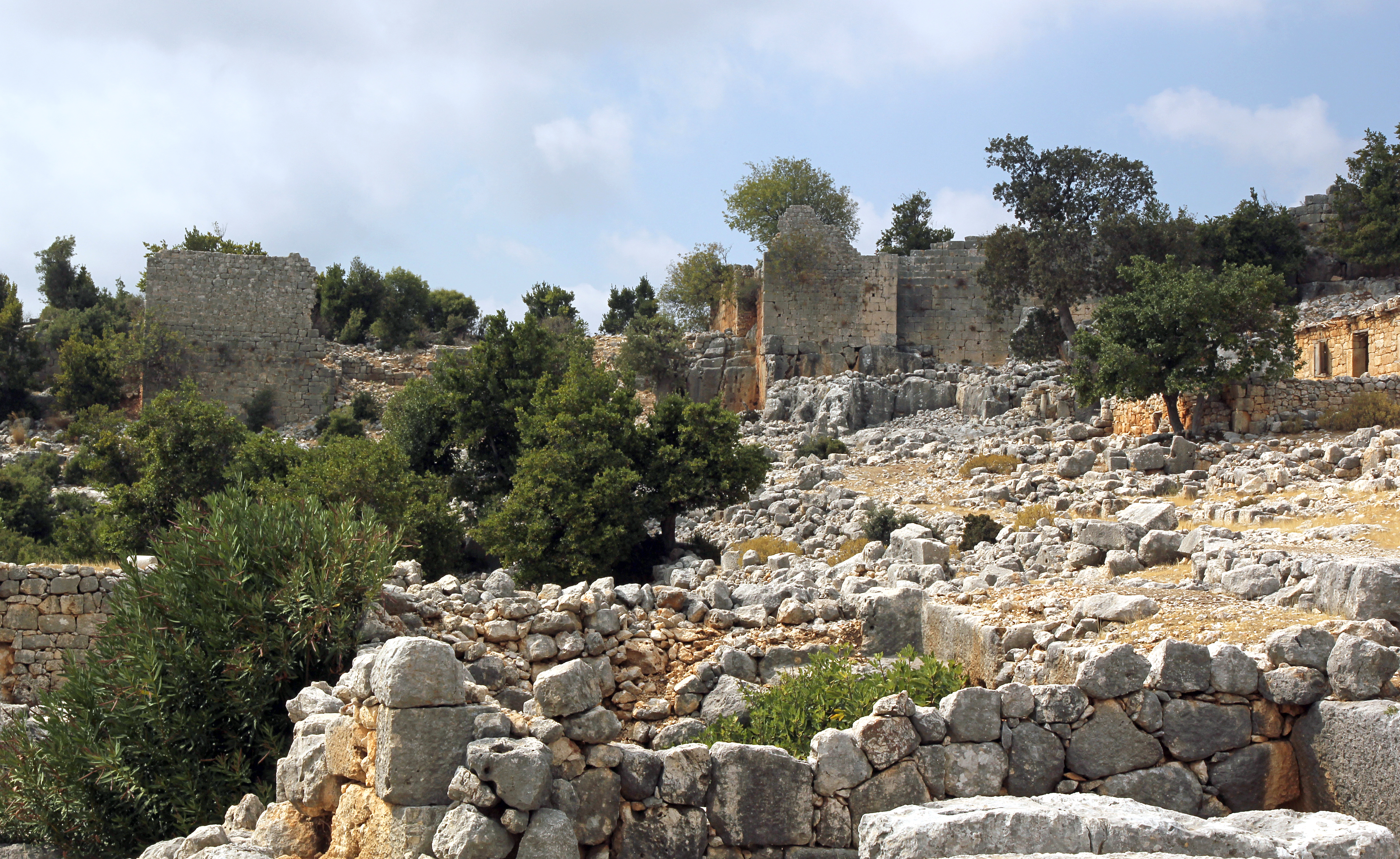 Tekkadın, römisch-byzantinische Siedlung in Kilikien bei Silifke, Südtürkei, Befestigungsmauern